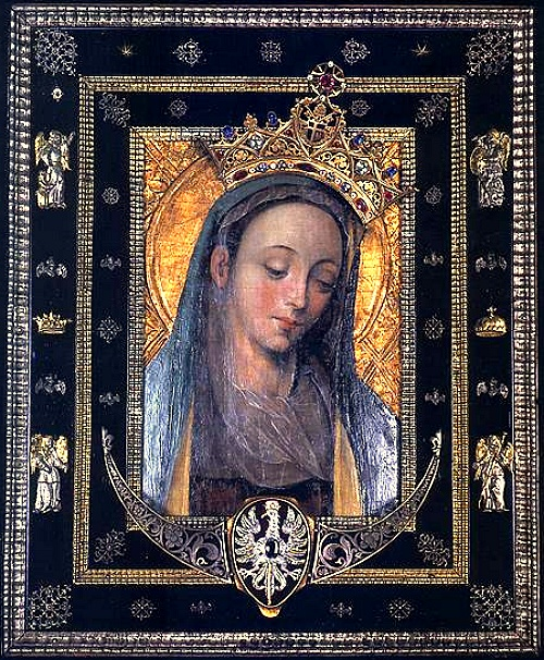 Matka Boża Rokitniańska Cierpliwie Słuchająca z godłem Polski umieszczonym tam w 1671 r. przez króla Michała Korybuta Wiśniowieckiego.